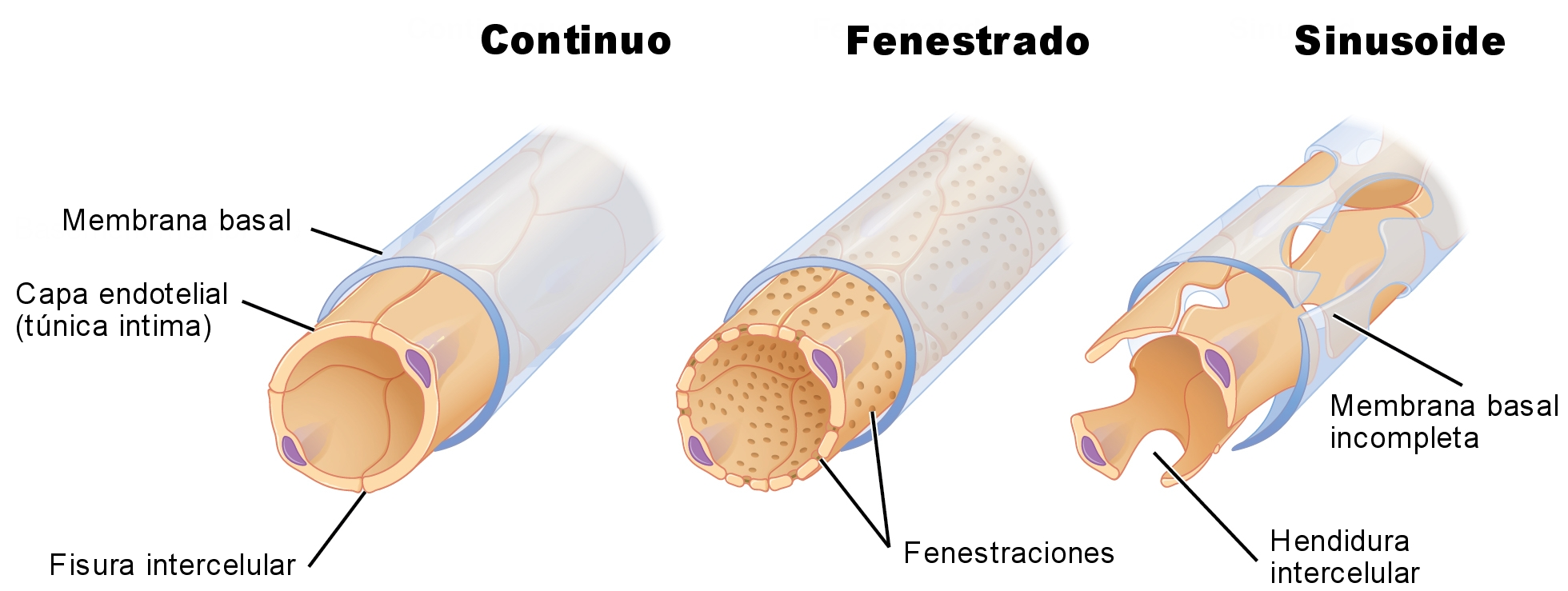 Esquema en el que se muestran las diferencias existentes entre los tres tipos de capilares sanguíneos: continuos, fenestrados y sinusoides.